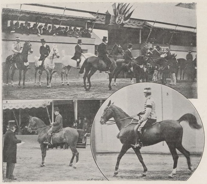 P359 : Concours de chevaux de selle - Concours hippique international de 1900 / Jeux Olympiques de 1900